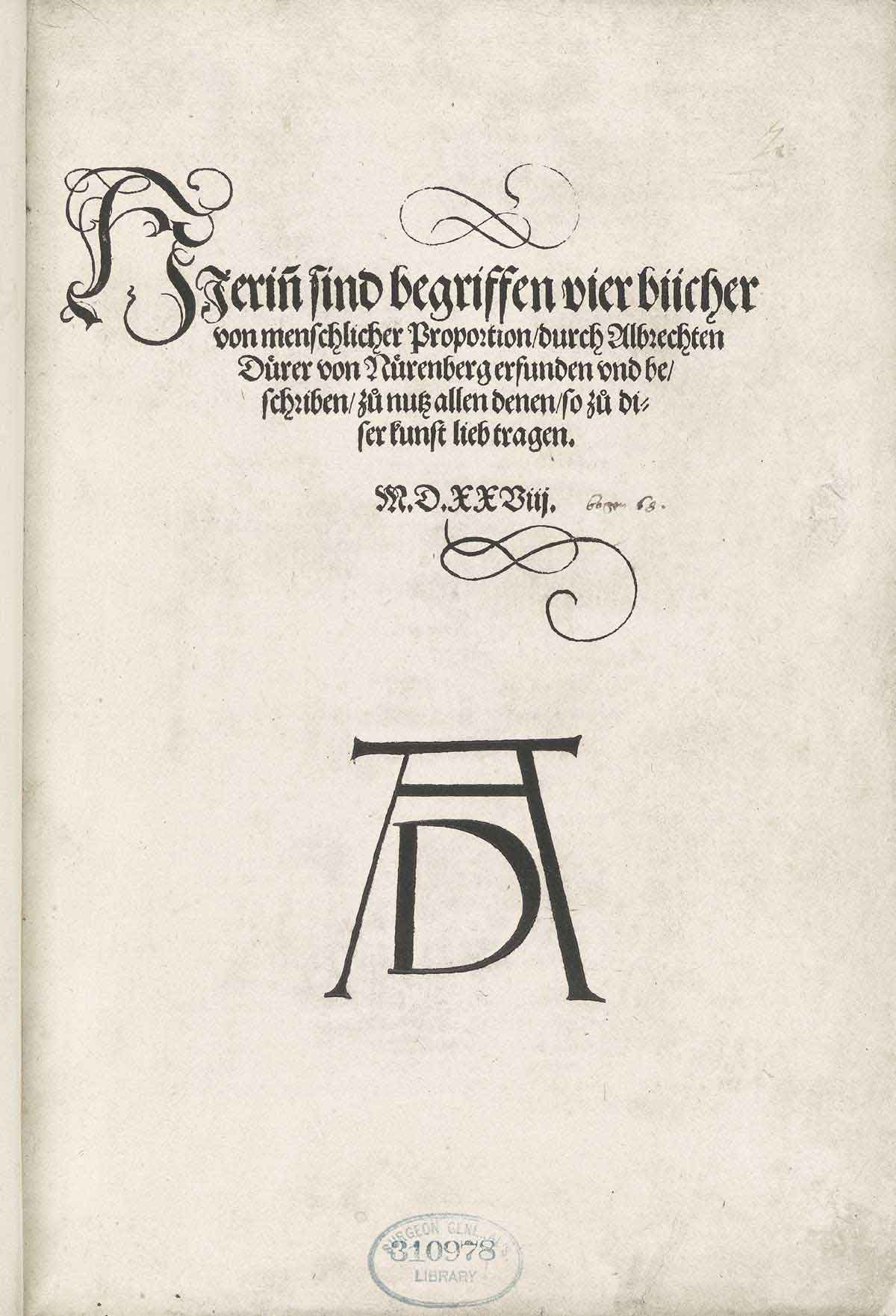 Vier bücher von menschlicher proportionDürer, Albrecht (1528) (in German) Vier Bücher von menschlicher Proportion, Nuremberg: Formschneyder, title page OCLC: 313271368.